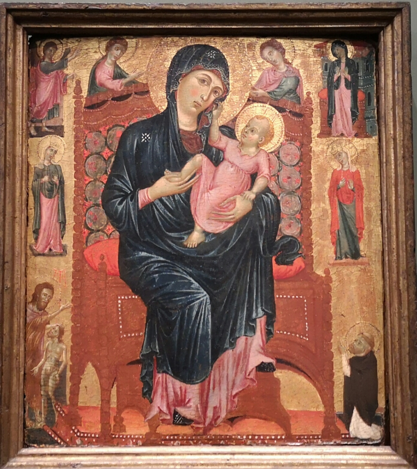 Maître de la Madeleine, Vierge à l'Enfant.